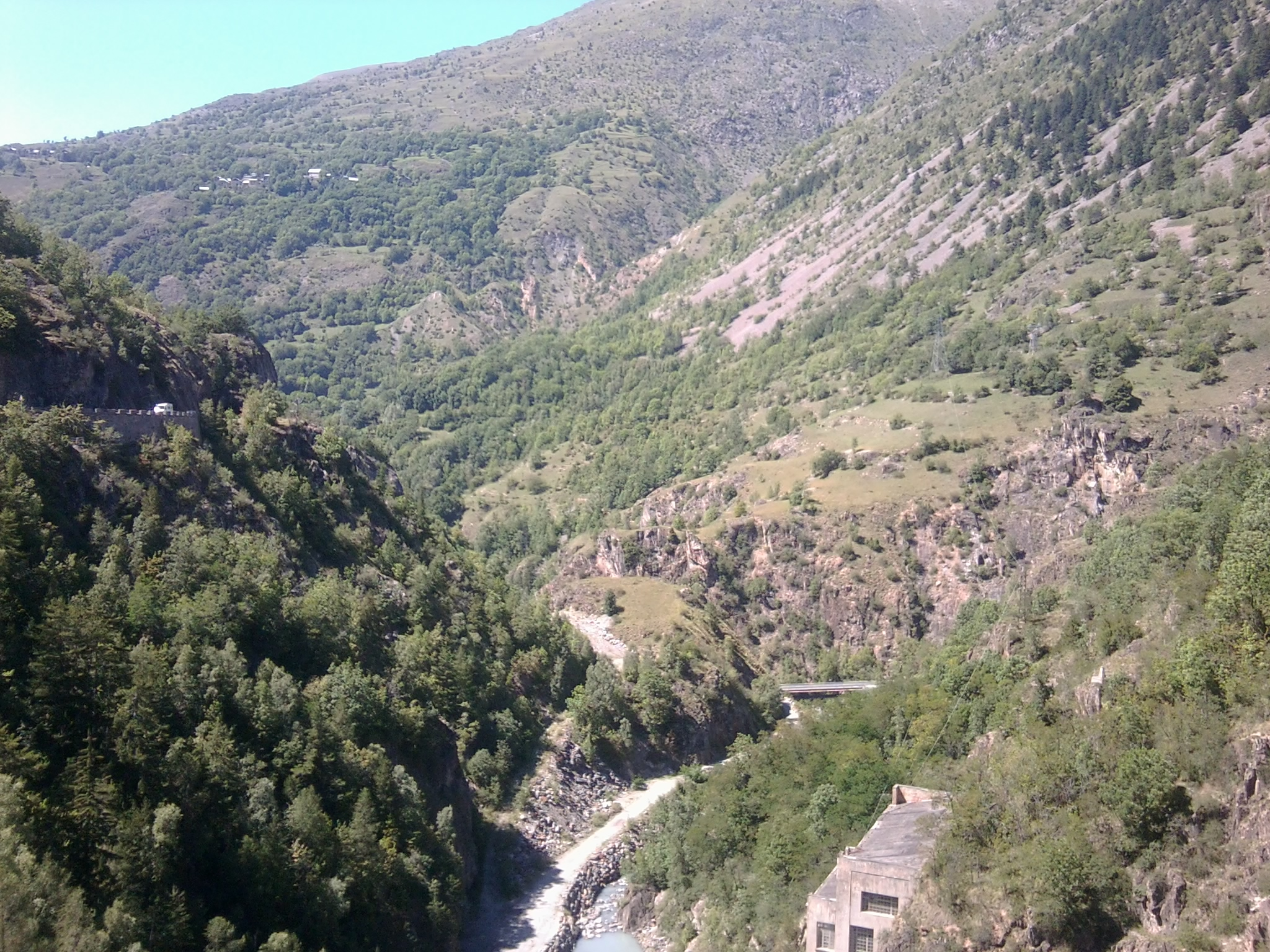 Barrage du Chambon (38) : La vallée.